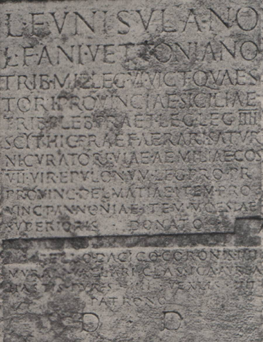 Römische Ehreninschrift aus Andautonia, gefunden bei Šćitarjevo (Velika Gorica), Kroatien. Heute im Archäologischen Museum von Zagreb. Belegstellen: CIL III 04013; J. Brunšmid, Vjesnik VIII 1905, 65 Nr. 125; Hoffiller - Saria Nr. 474 und 479; Fitz, Verwaltung Pannoniens 1993 Nr. 61/3; B.E. Thomasson, Fasti Africani. Senatorische und ritterliche Amtsträger in den römischen Provinzen Nordafrikas von Augustus bis Diokletian (Stockholm 1996) 47, Nr. 54a.; M. Sanader, in: M. Sanader (Hrsg.), Kroatien in der Antike (Mainz 2007) 120; Abb. 111. Text: L(ucio) Funisulano / L(uci) f(ilio) Ani(ensi) Vettoniano / trib(uno) mil(itum) leg(ionis) VI Vict(ricis) quaes/tori provinciae Siciliae / trib(uno) pleb(is) praet(ori) leg(ato) leg(ionis) IIII / Scythic(ae) praef(ecto) aerari(i) Satur/ni curatori viae Aemiliae co(n)s(uli) / VIIvir(o) epulonum leg(ato) pro pr(aetore) / provinc(iae) Dalmatiae item pro/vinc(iae) Pannoniae item Moesiae / superioris donato [ab] / [Imp(eratore) Domitiano Aug(usto) Germani]/[co] bello Dacico coronis IIII / murali vallari classica aurea / hastis puris IIII vex(il)lis IIII / patrono / d(ecreto) d(ecurionum)